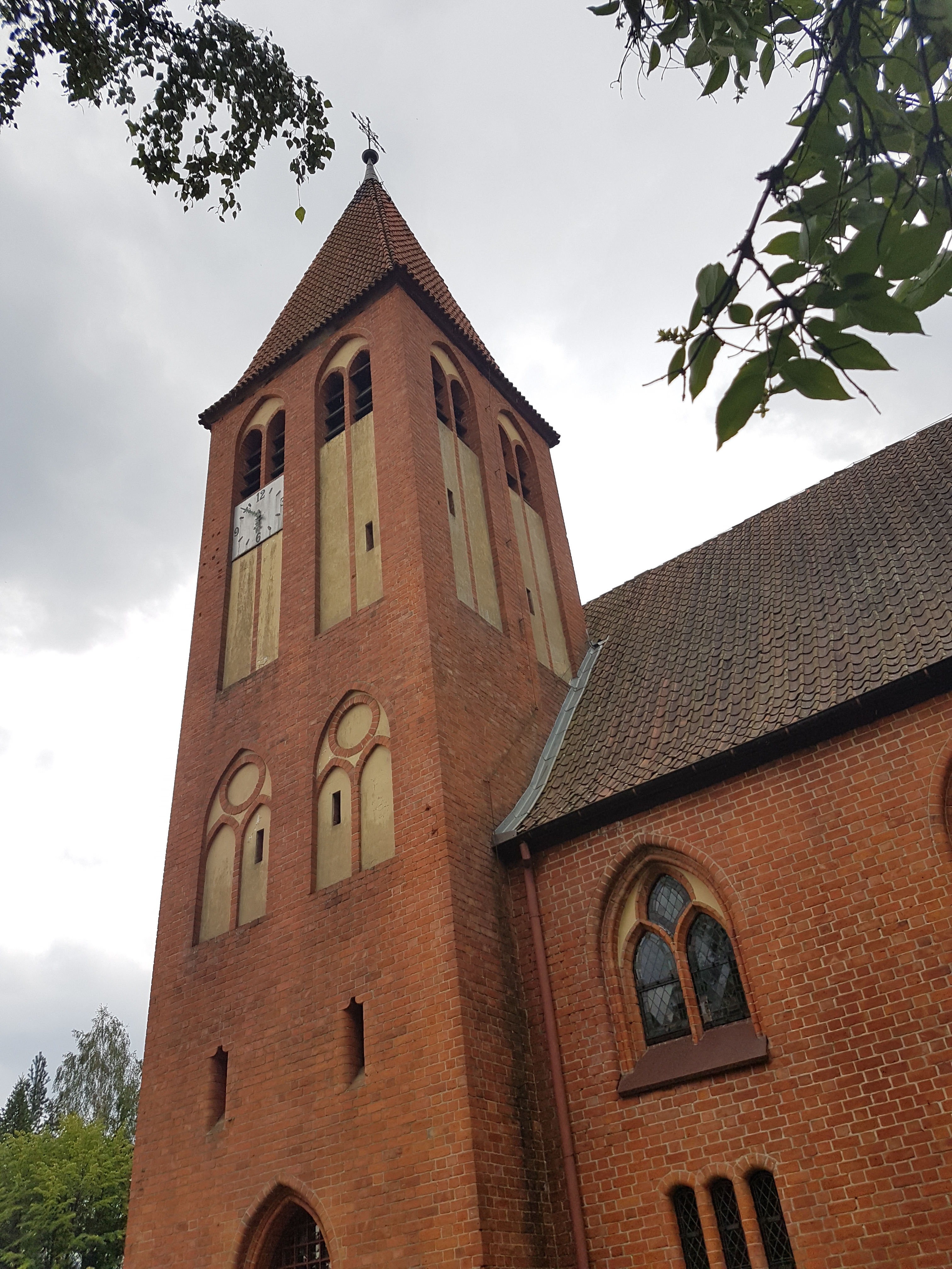 Spychowo, ul. Mazurska 9 - dawny kościół ewangelicki, obecnie rzymskokatolicki parafialny p.w. Matki Boskiej Nieustającej Pomocy, 1903-1906